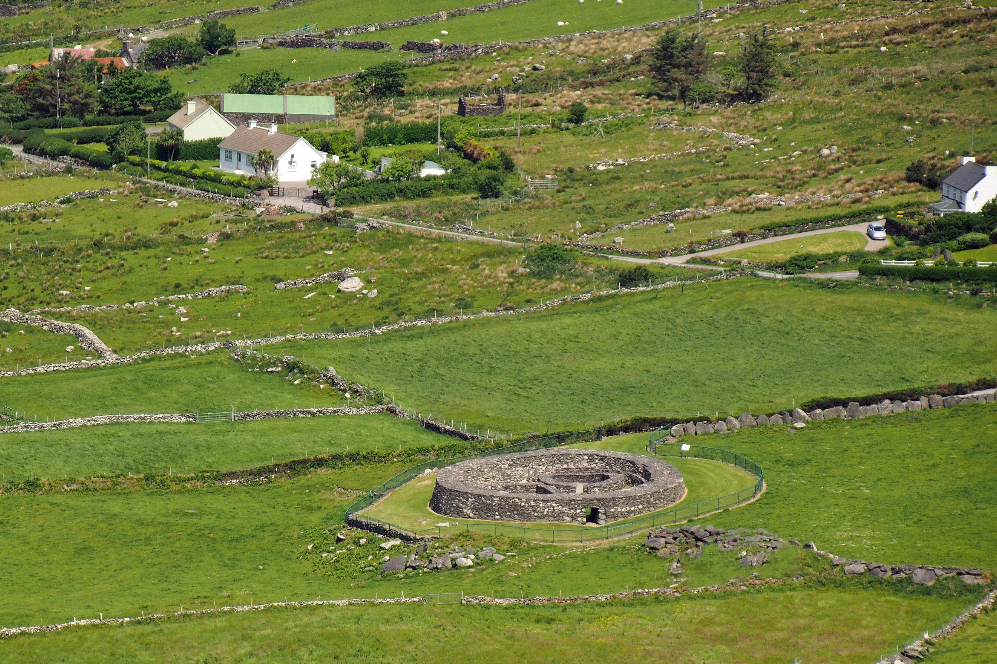 Loher Stone Fort, County Kerry, Irland